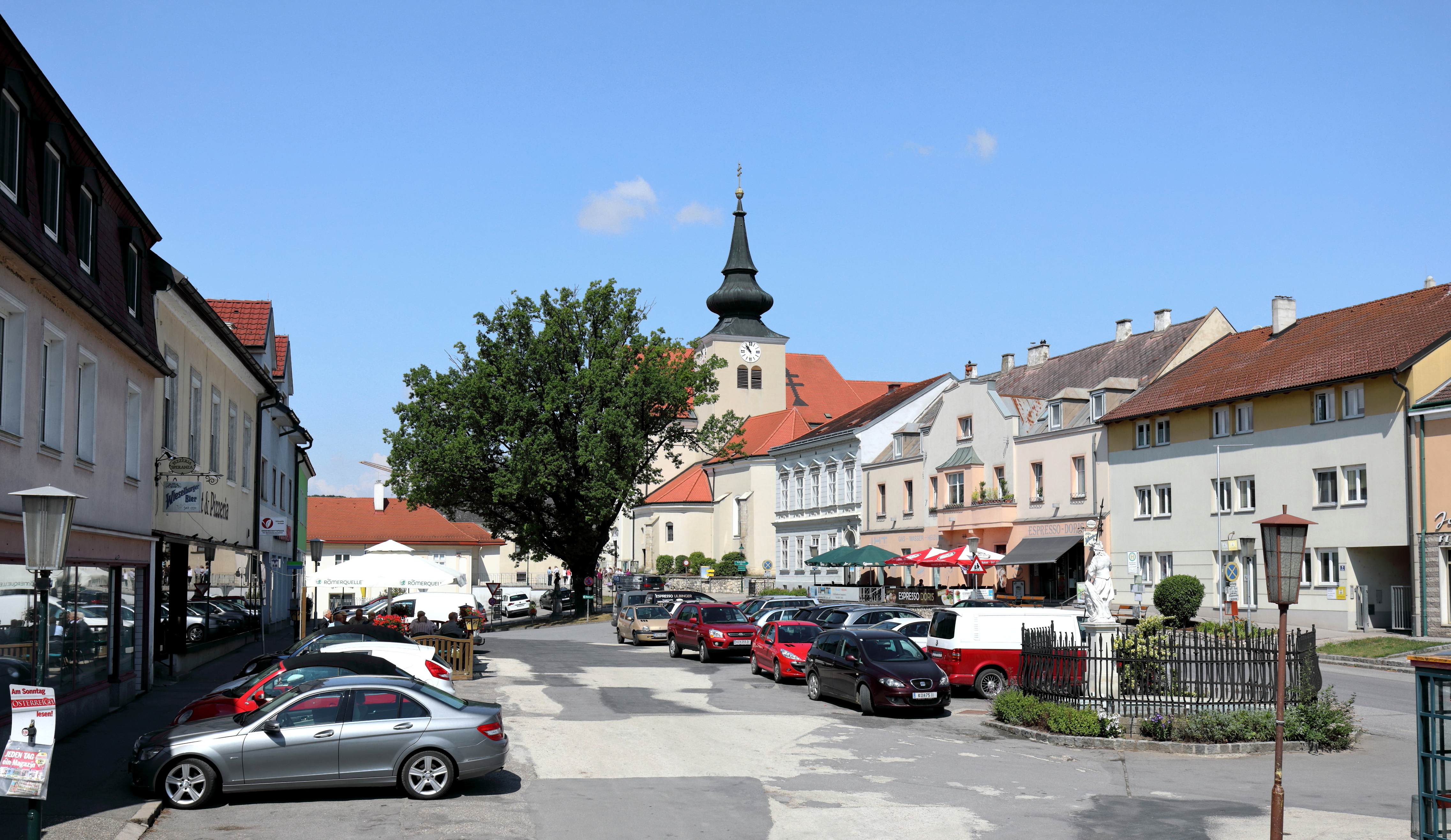 Westseite des Hauptplatzes der niederösterreichischen Marktgemeinde Ernstbrunn mit der röm.-kath. Pfarrkirche hl. Martin im Hintergrund und dem Landsknechtbrunnen rechts im Vordergrund.